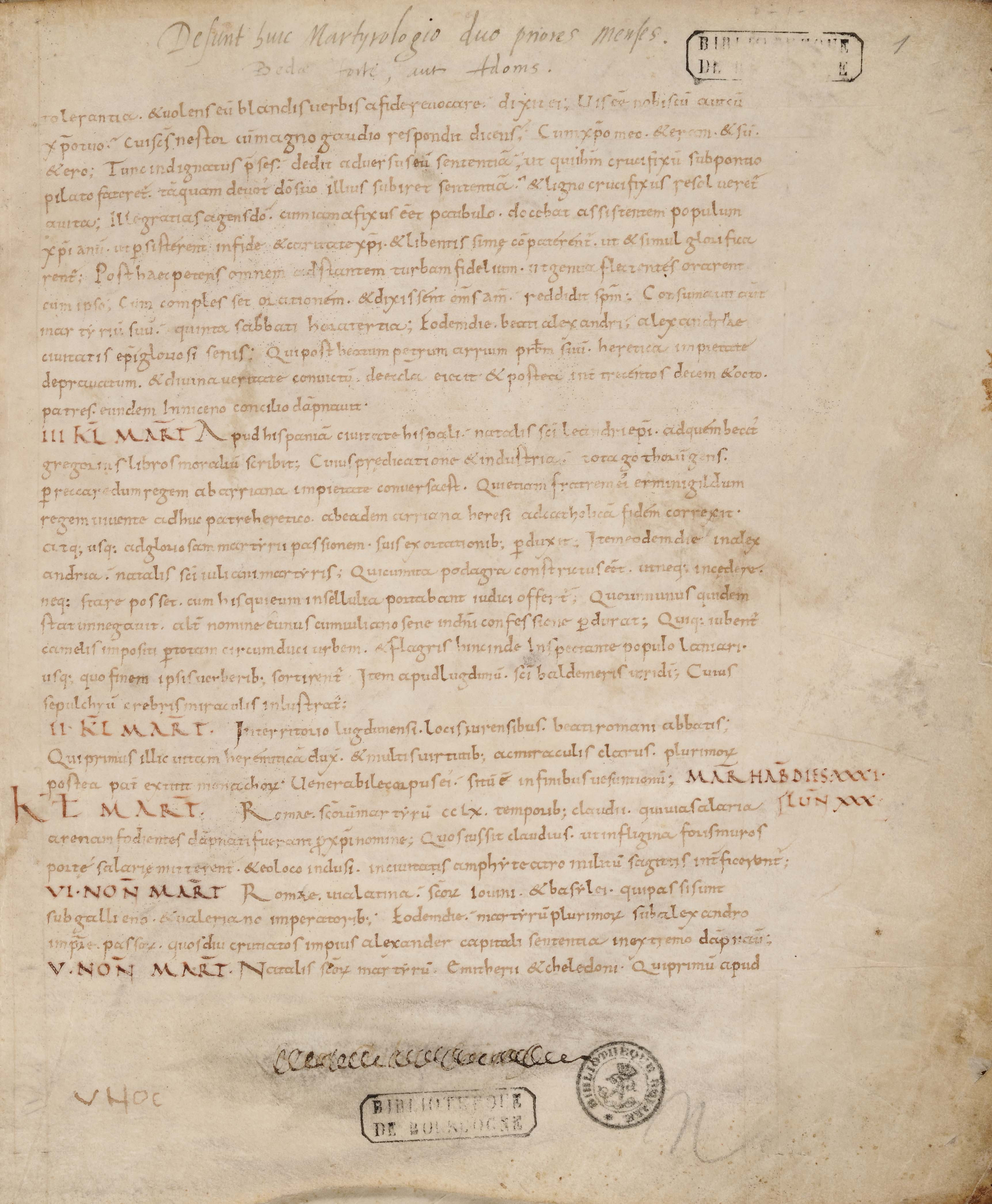 Catalogus codicum hagiographicorum Bibliothecae Regiae Bruxellensis, I, 1. Bruxellis, 1886, p. 297-298, nr. XXXIV. J. Van den Gheyn, Catalogue des manuscrits de la Bibliothèque royale de Belgique, I. Bruxelles, 1901, p. 304-305, nr. 481. Historische Sammlung Bibliotheca Carolina